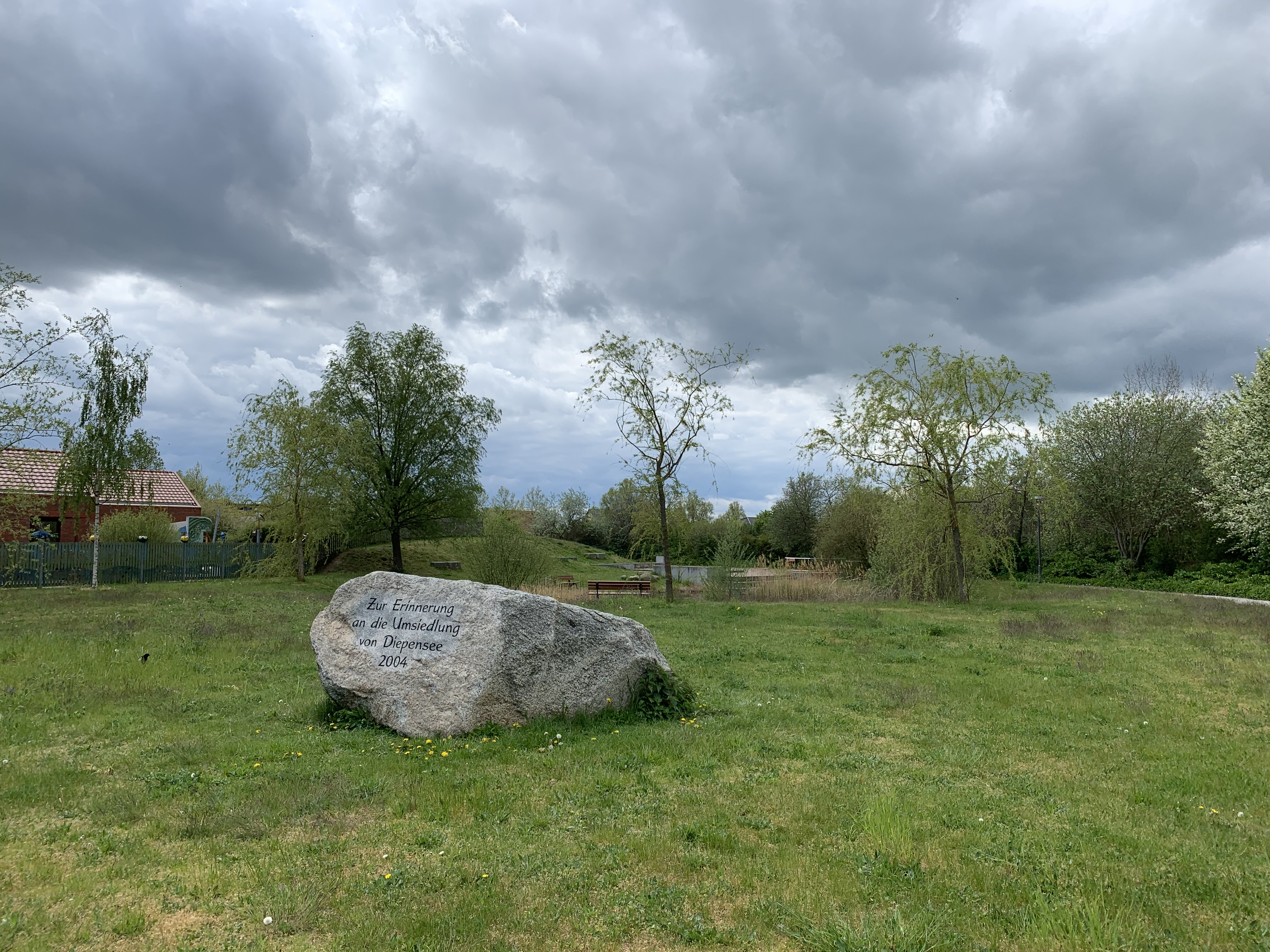 Diepensee, ein Ortsteil der Stadt Königs Wusterhausen in Brandenburg